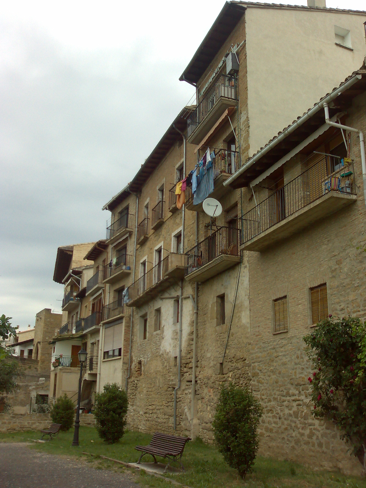 Arga ibaitik gertu dauden etxe zaharren ikuspegia.